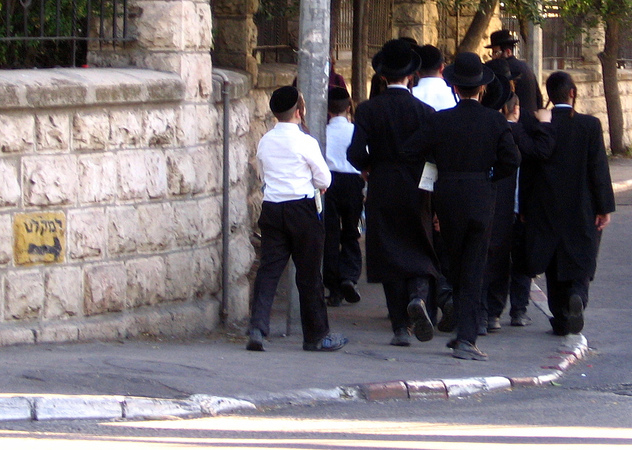 Meah Shearim, Jerusaelm